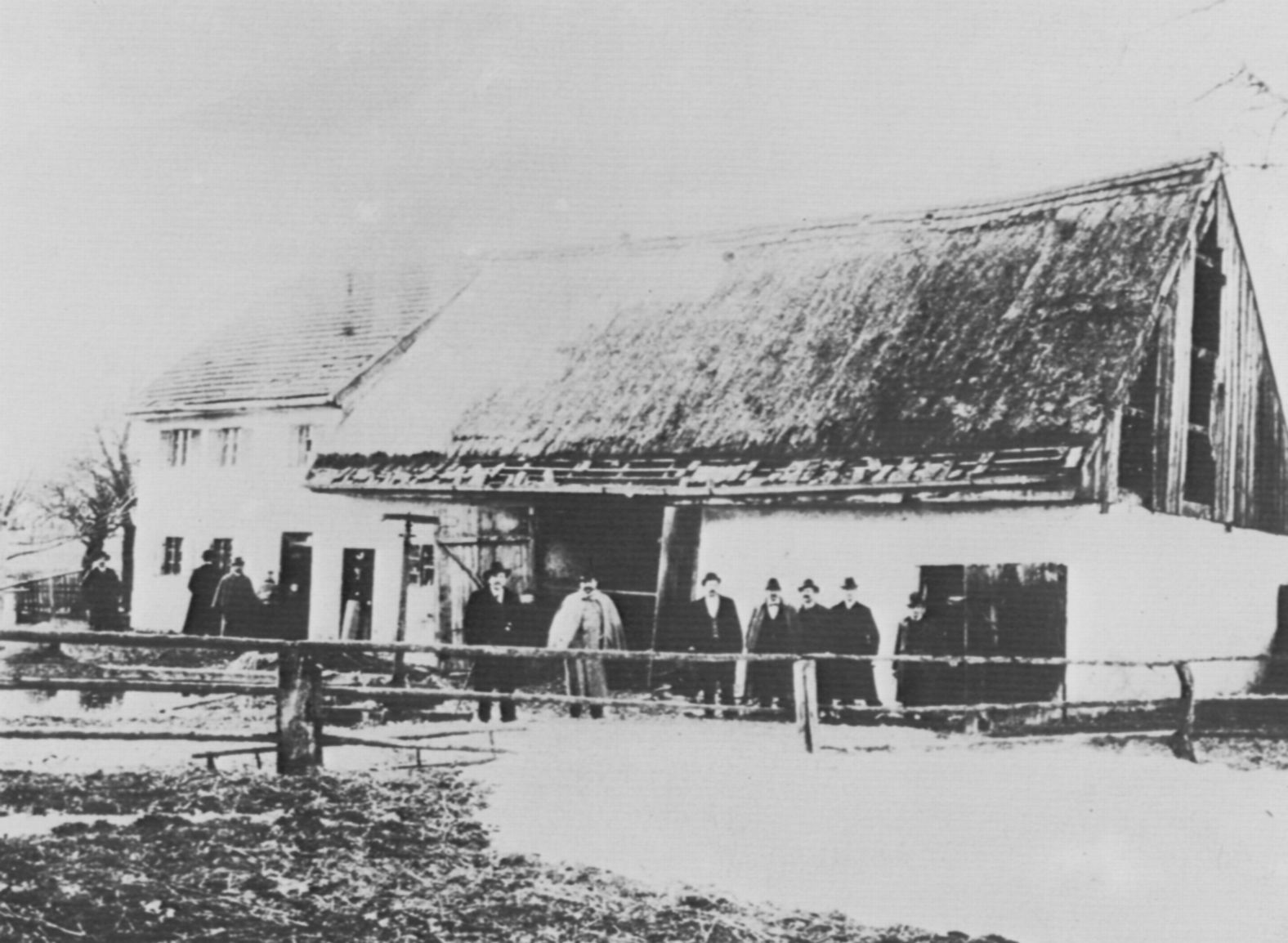 Originale Bildunterschrift: Tatortaufnahme. Nach einem »dramatischen Bombardament« wurde in diesem Haus in Geisenhofen bei Fürstenfeldbruck Mathias Kneißl festgenommen.